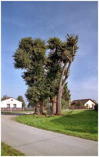 Dobřenická lípa